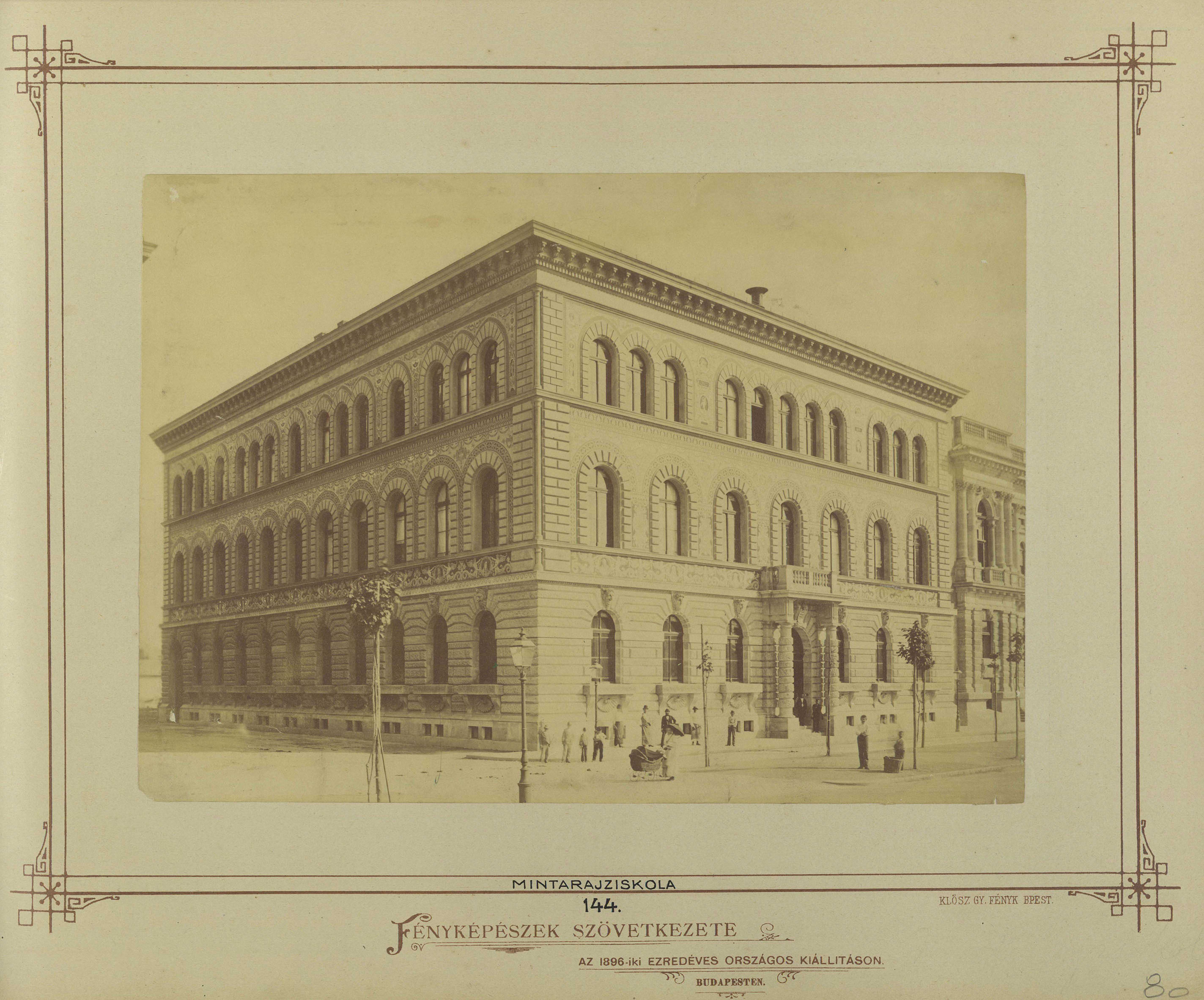 Andrássy (Sugár) út 71., Magyar Királyi Országos Mintarajziskola (ma Magyar Képzőművészeti Egyetem). Balra az Izabella utca. A felvétel 1878 körül készült. A kép forrását kérjük így adja meg: Fortepan / Budapest Főváros Levéltára. Levéltári jelzet: HU.BFL.XV.19.d.1.05.157